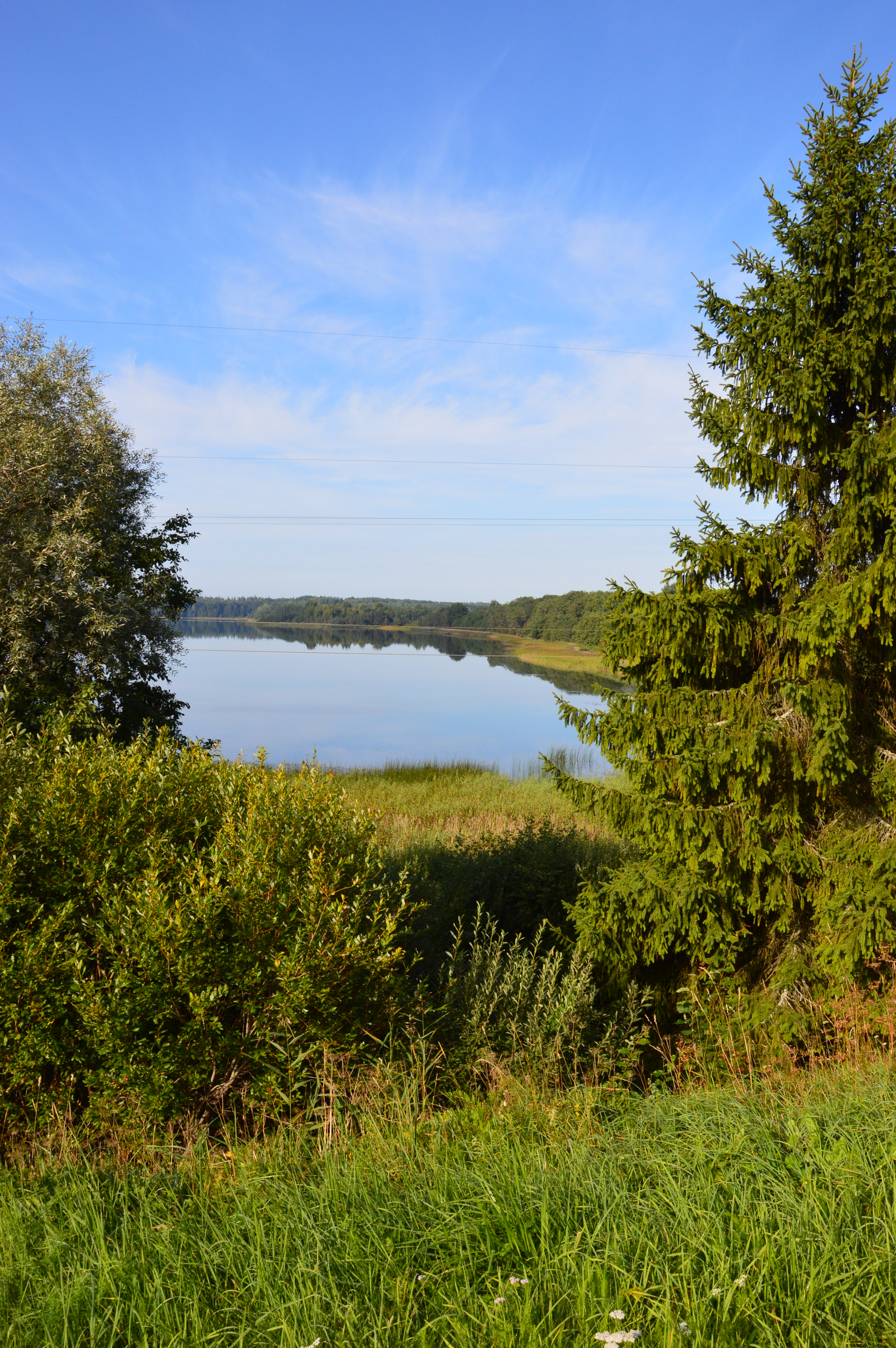 Jõksi järv vaadatuna Tallinna–Tartu–Võru–Luhamaa maanteelt.